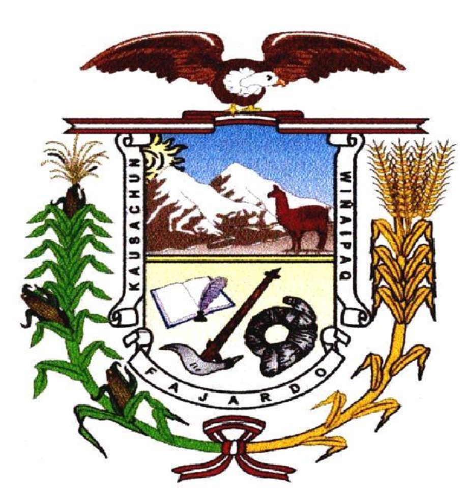 Escudo Oficial de la Municipalidad Provincial de Fajardo - Huancapi